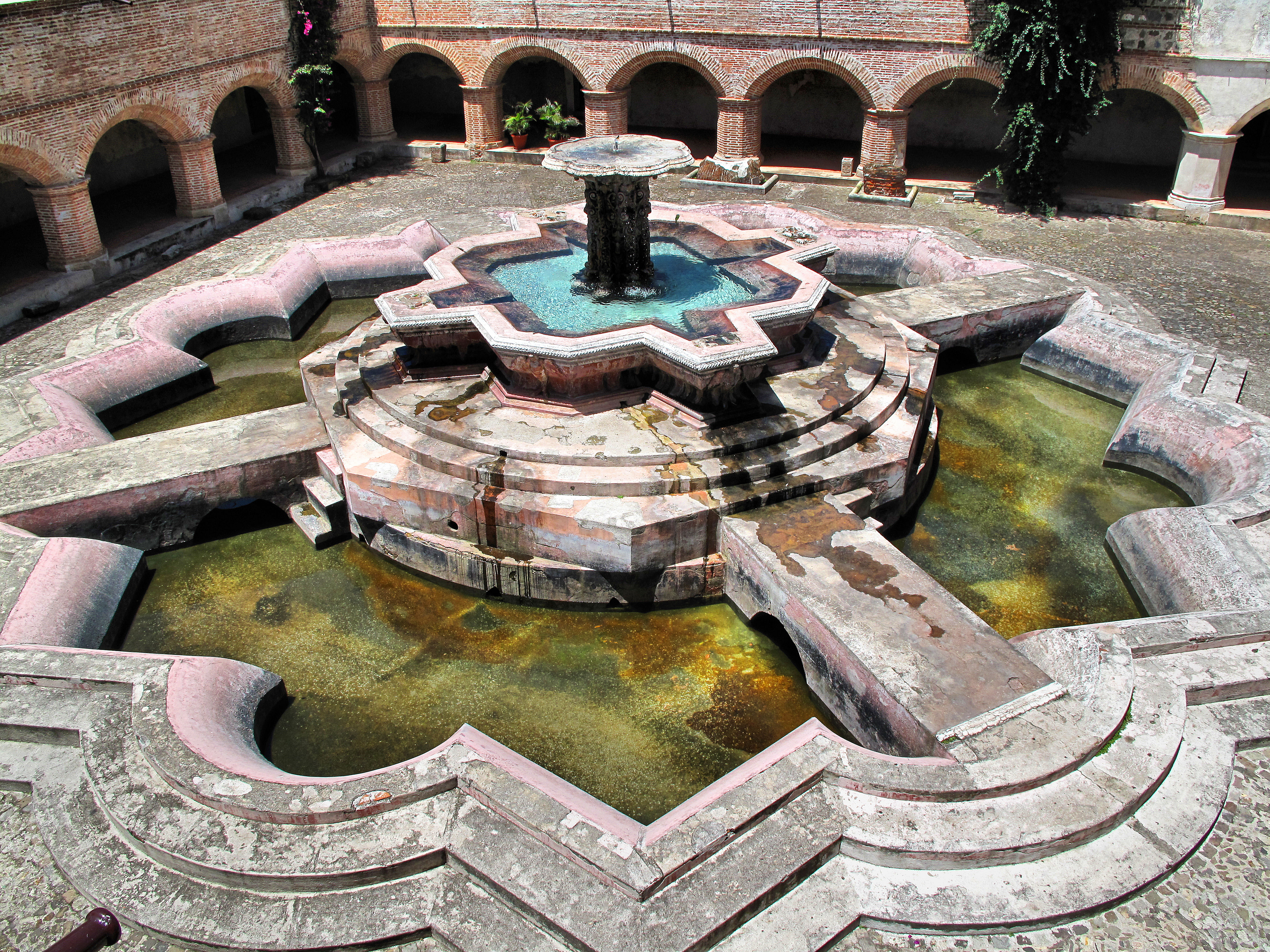 Convento de la Merced, Antigua Guatemala